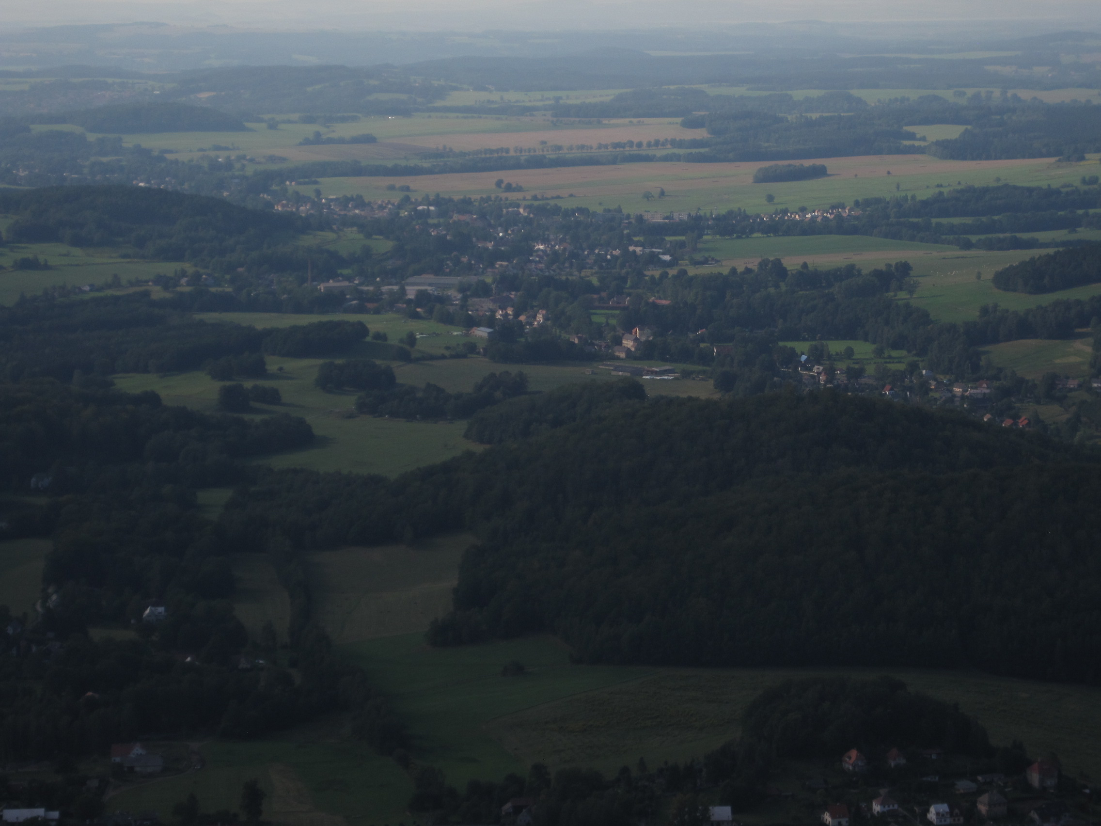 Část Ferdinandova, vrch Na Chatkách a město Raspenava z Ořešníku